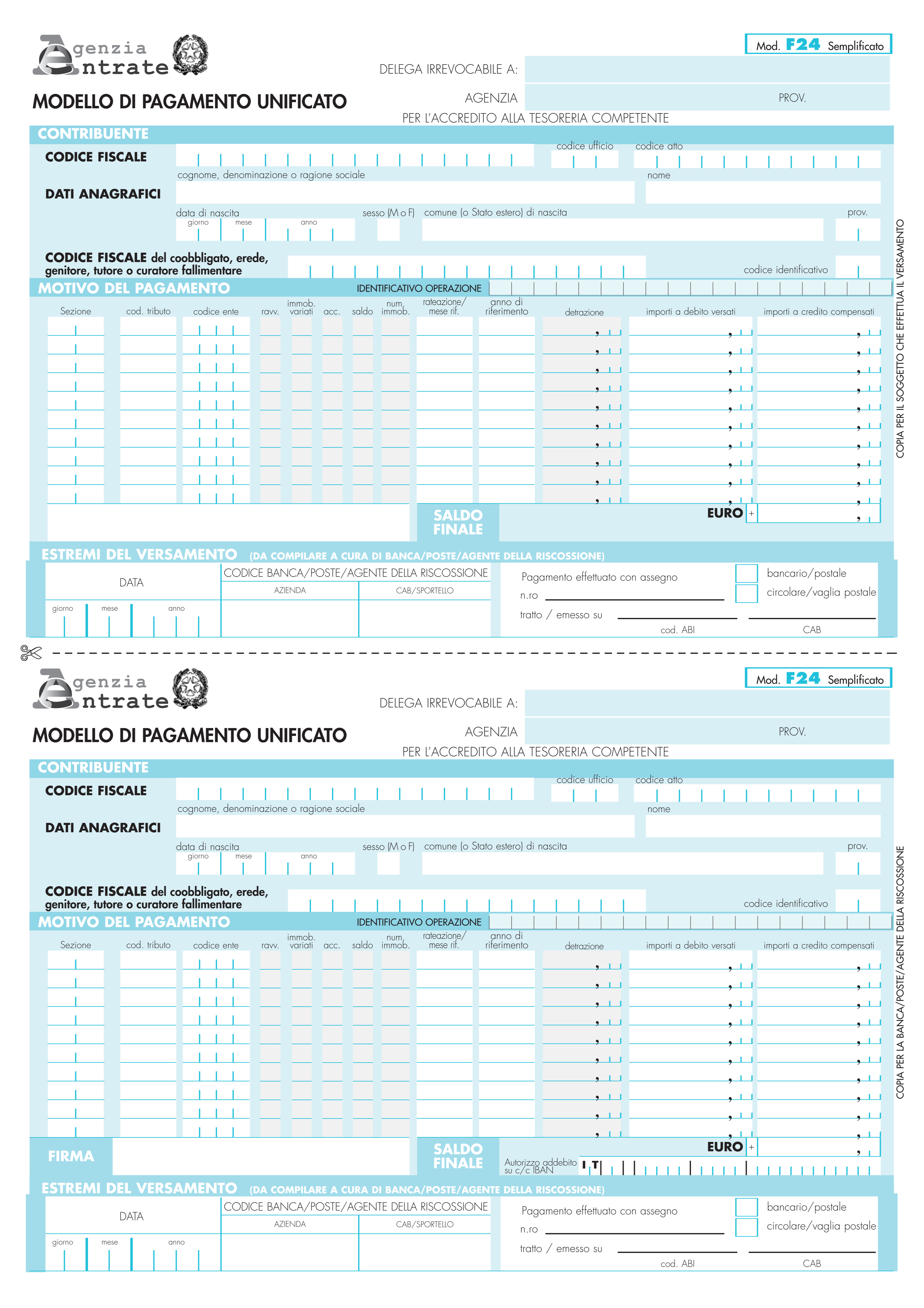 Modello di versamento unificato F24 Semplificato